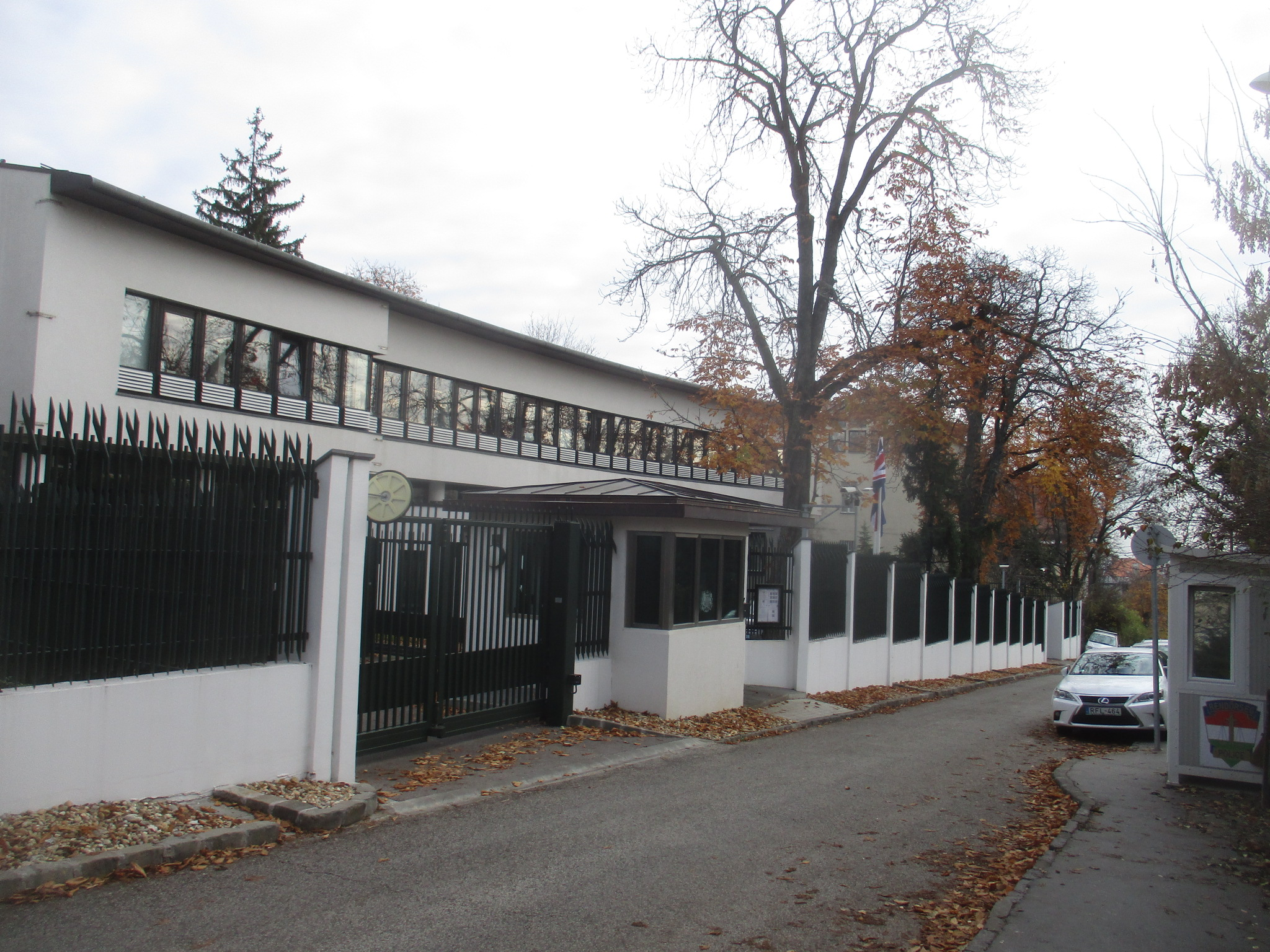 Az Egyesült Királyság budapesti nagykövetsége - Budapest II. Füge utca 5-7